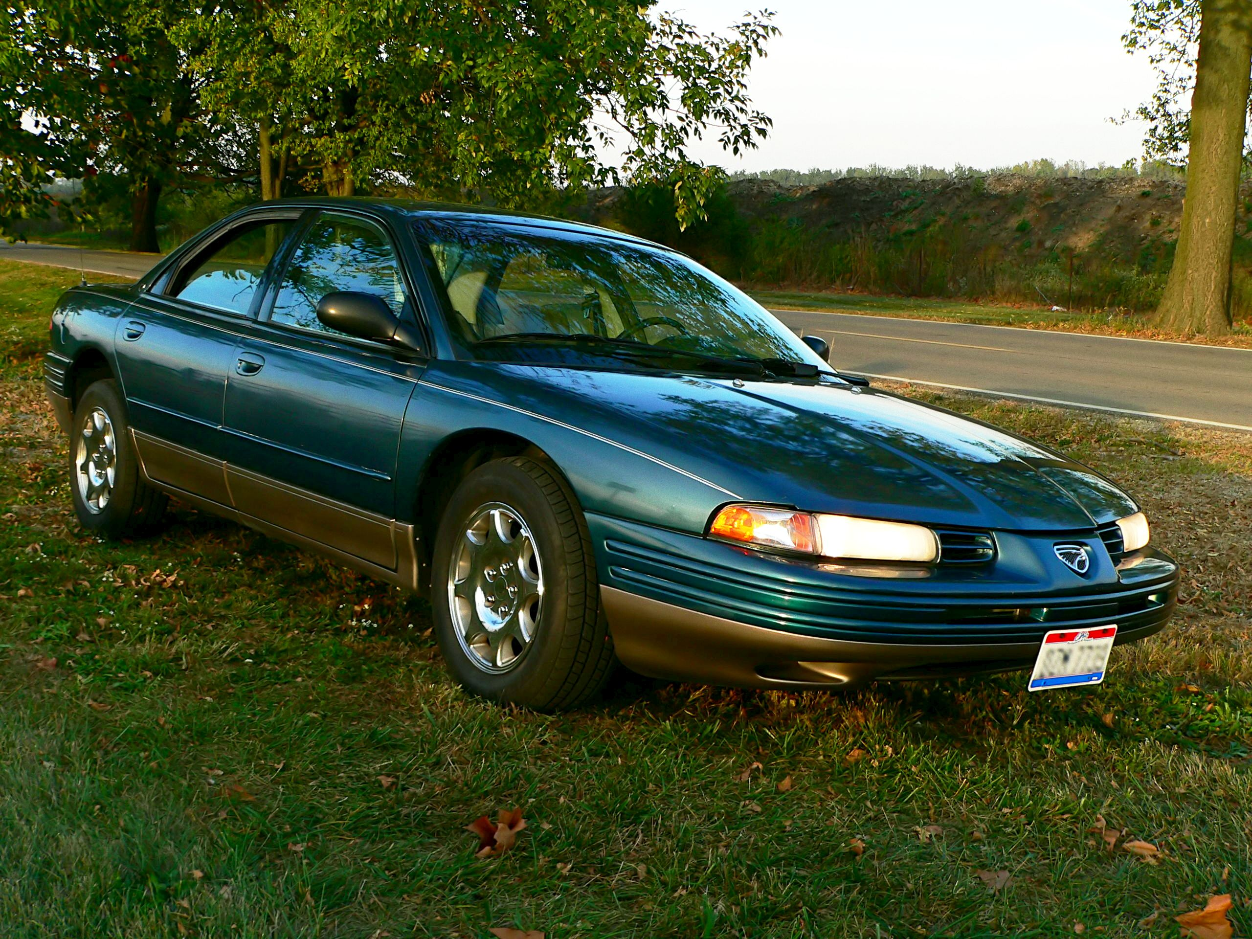 1995 Eagle Vision ESi Sedan 3.5L